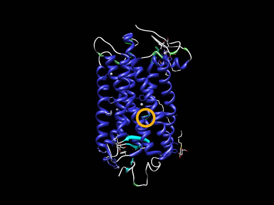 Rodoopsina modelada en el programa chimera. Resaltado en el círculo esta el aminoácido de carga negativa que estabiliza la unión del cromóforo